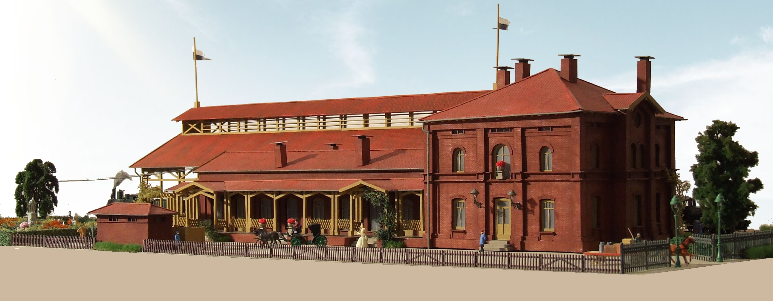 Ansicht des Alten Bahnhofs Landshut von Südosten - Modell im Maßstab 1:87 - Gebaut 2011 von Thorsten Hambusch, Landshut